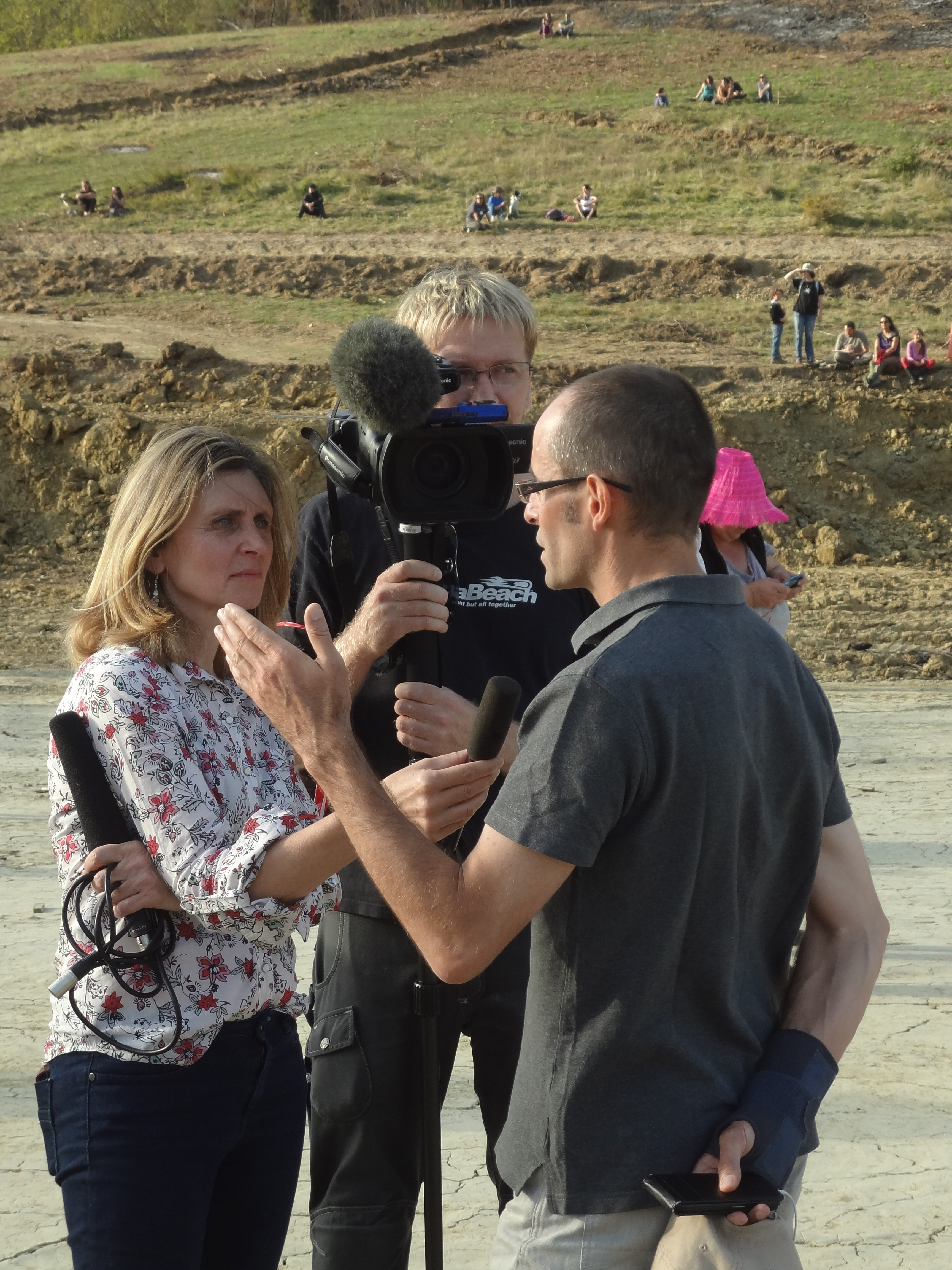 Interview lors de la marche blanche du 2 novembre 2014